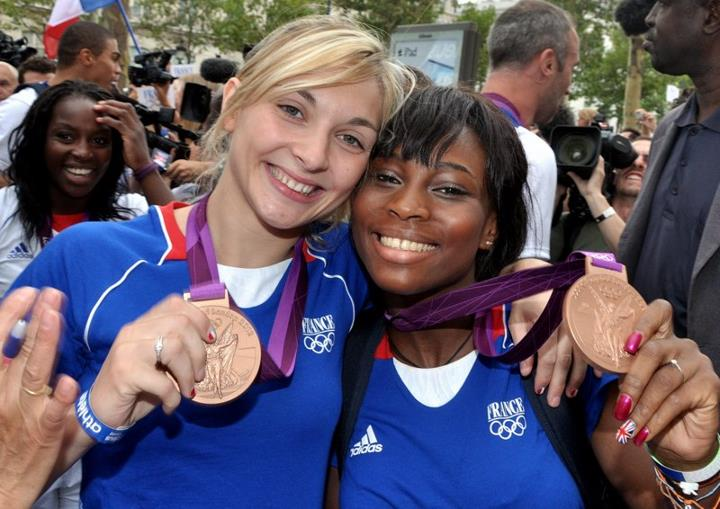 Défilé des médaillés français des JO 2012 - Automne Pavia et Priscilla Gneto